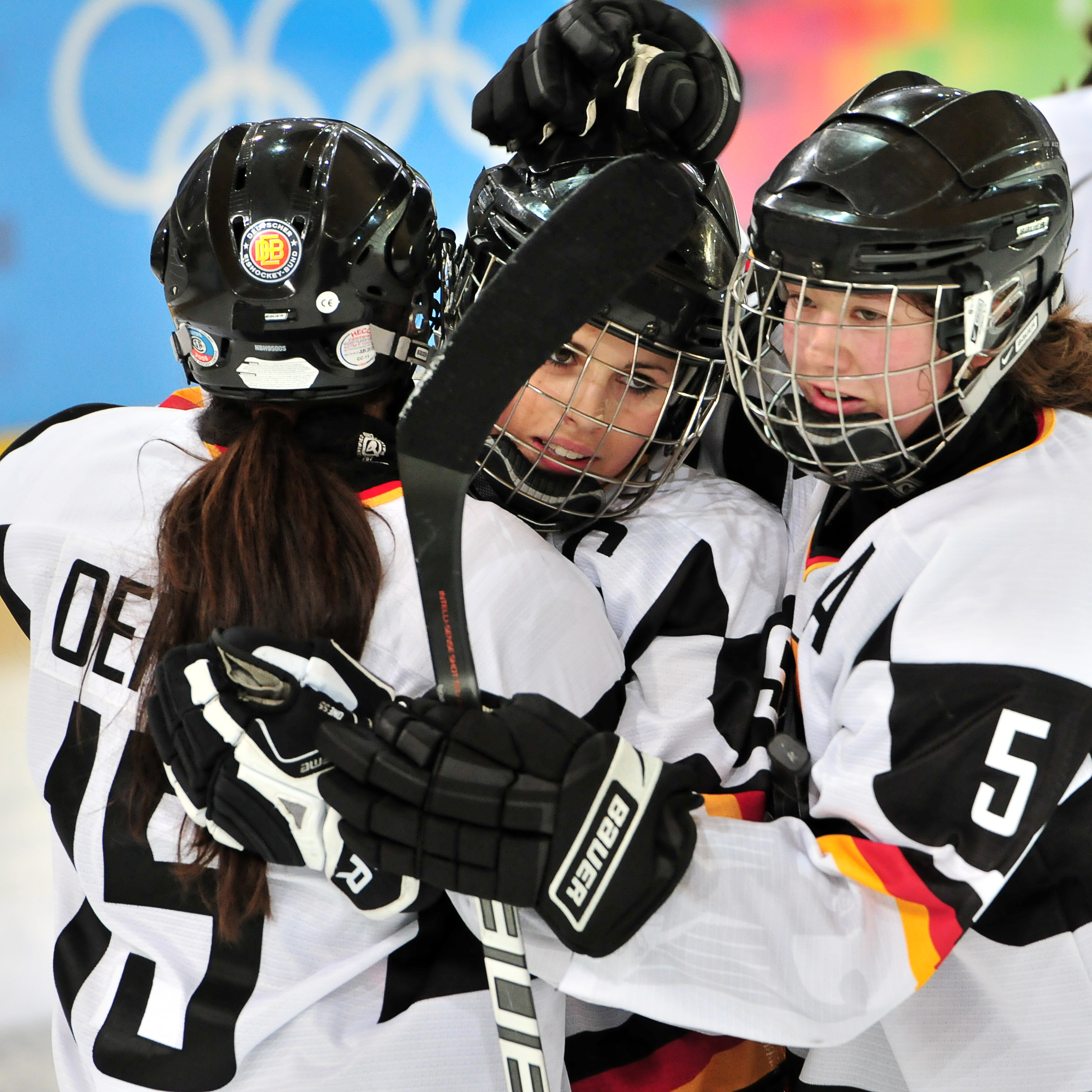 1. Jugendolympiade 2012 Innsbruck